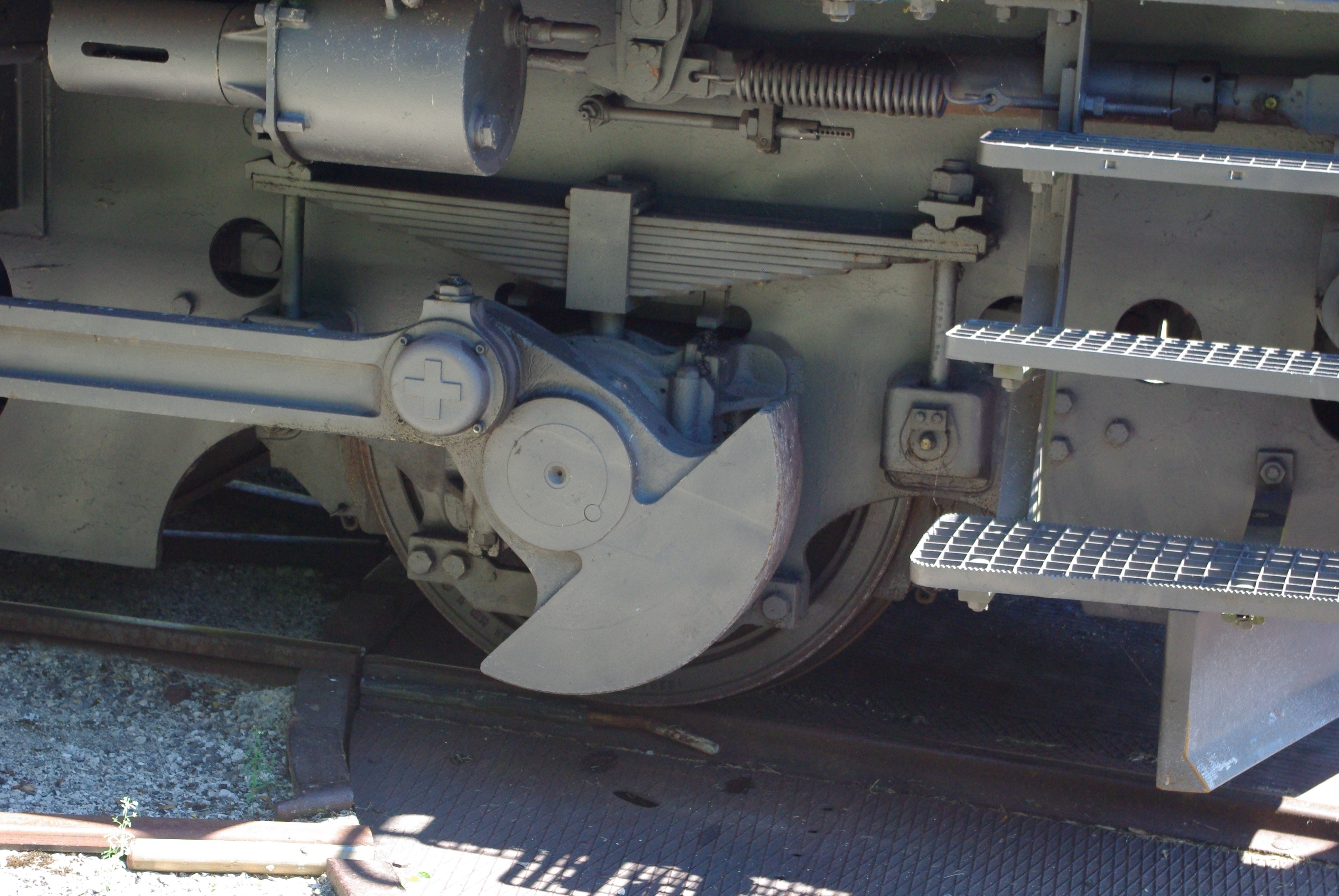 Roues de Tem II 288 à la gare du Pont lors de la sortie photo du 18/08/2012